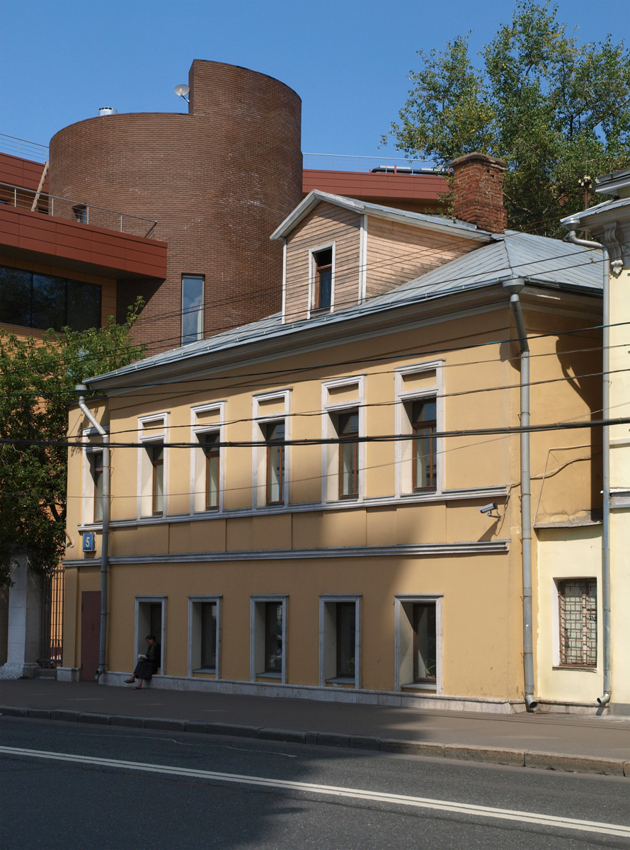 Taganskaya Street, Moscow